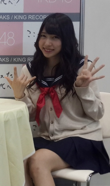 150505 『여기가 로도스다 여기서뛰어라!』샤메회 후기 (Shinobu Mogi)